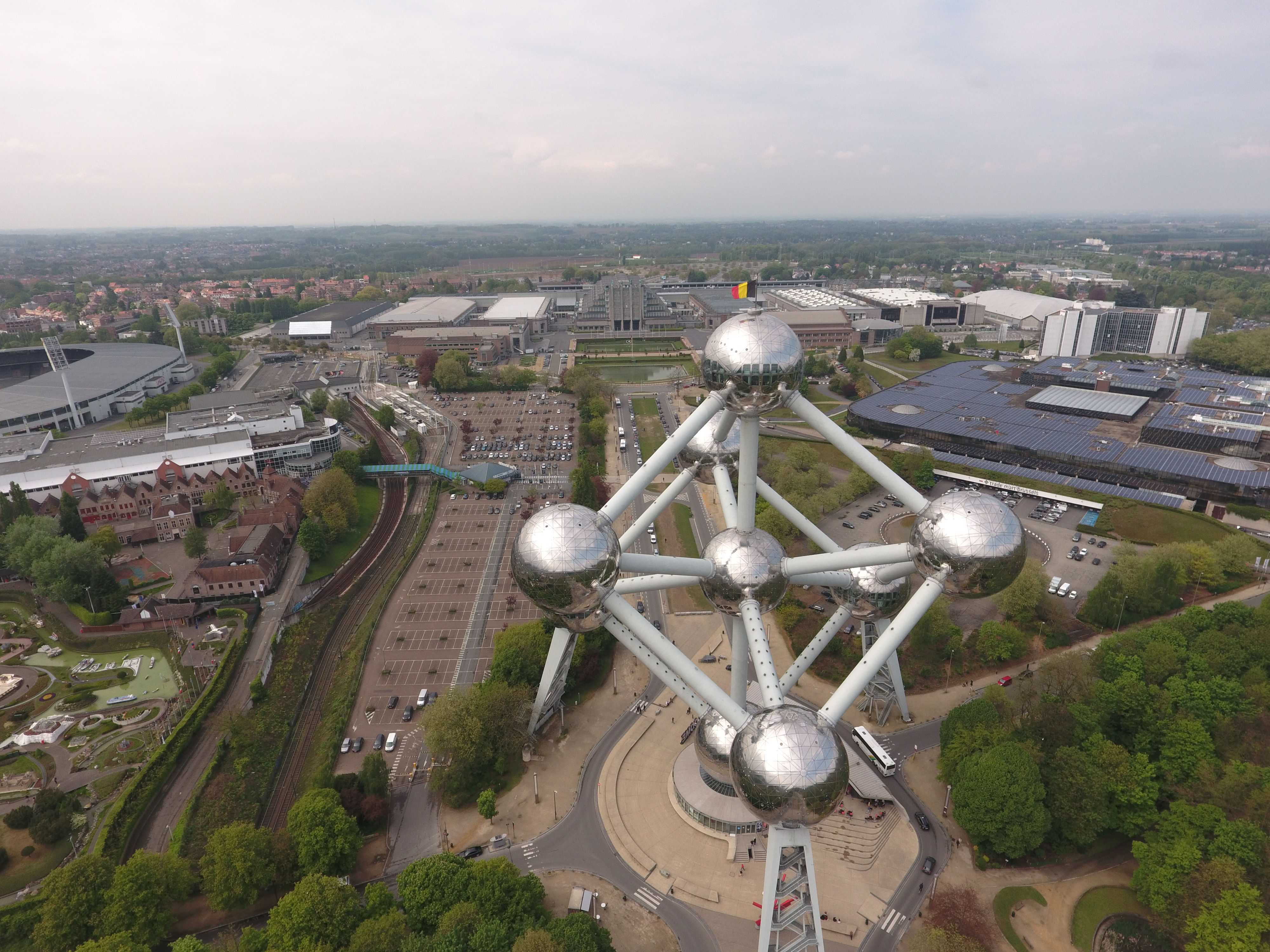 Bruxelas, Bélgica